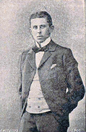 Иваск, Удо Георгиевич